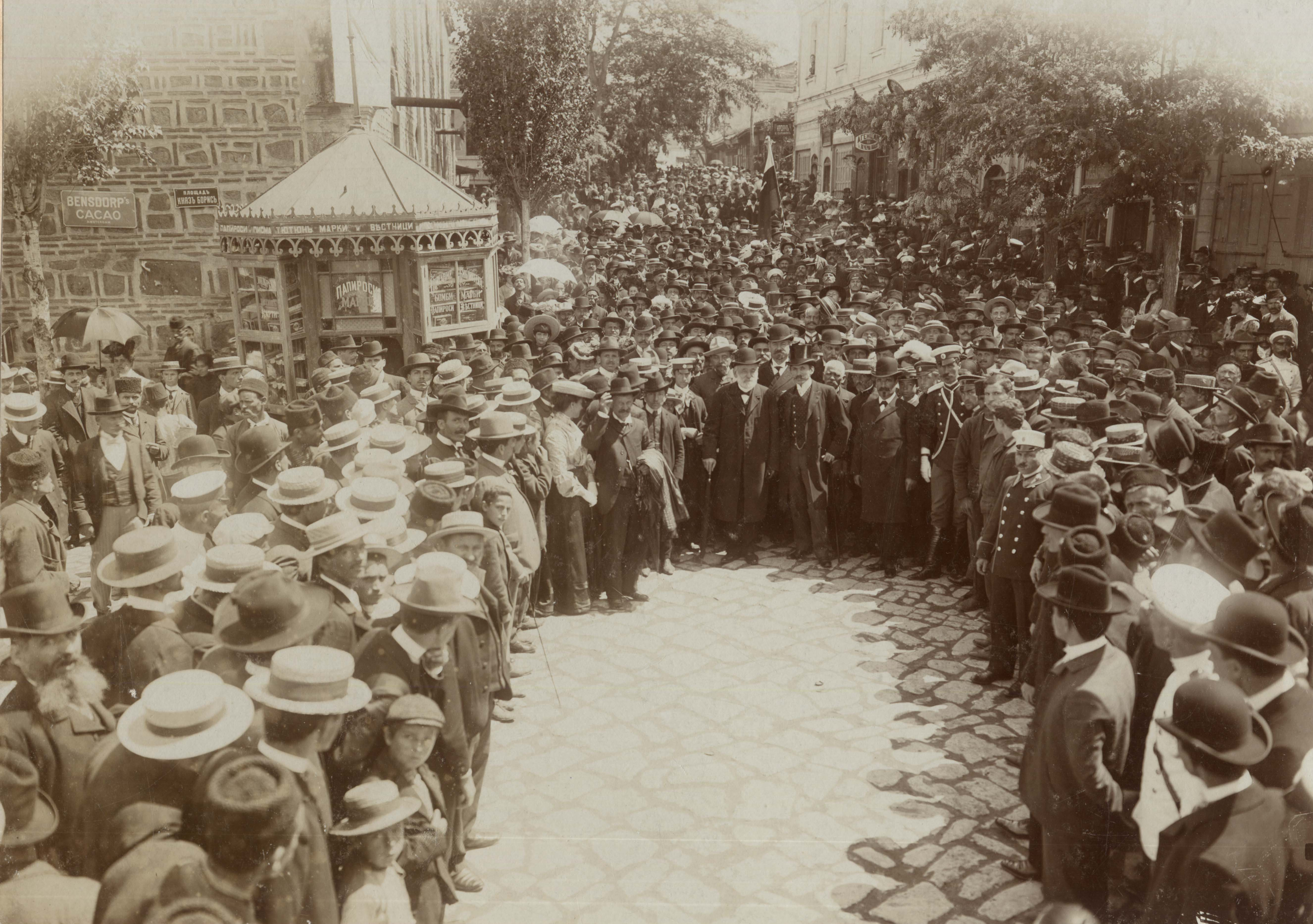 Христо Г. Данов (в средата заедно с Иван Шишманов по време на честването на 50-годишния юбилей на неговата дейност (Пловдив, 1905 г.)